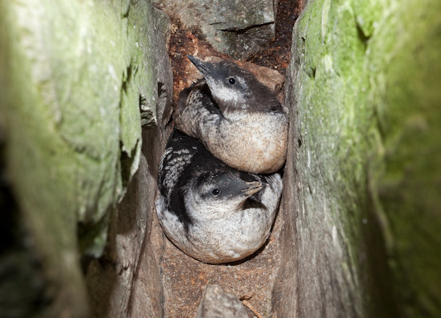 Junge Gryllteiste am Brutplatz